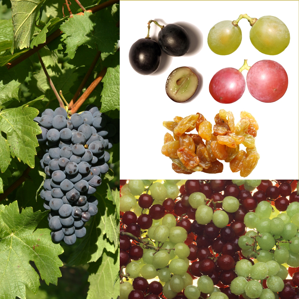 Grafika podręcznika Wikijunior:Owoce. Winogron, owoce winorośli właściwej (Vitis vinifera).